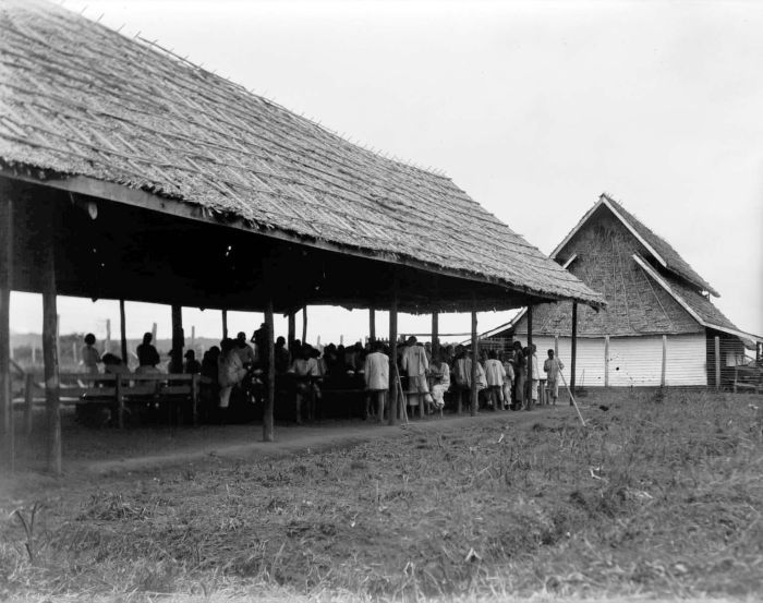 Negatief. Eetloods van het ziekenhuis van de Singkep Tin Maatschappij, Singkep